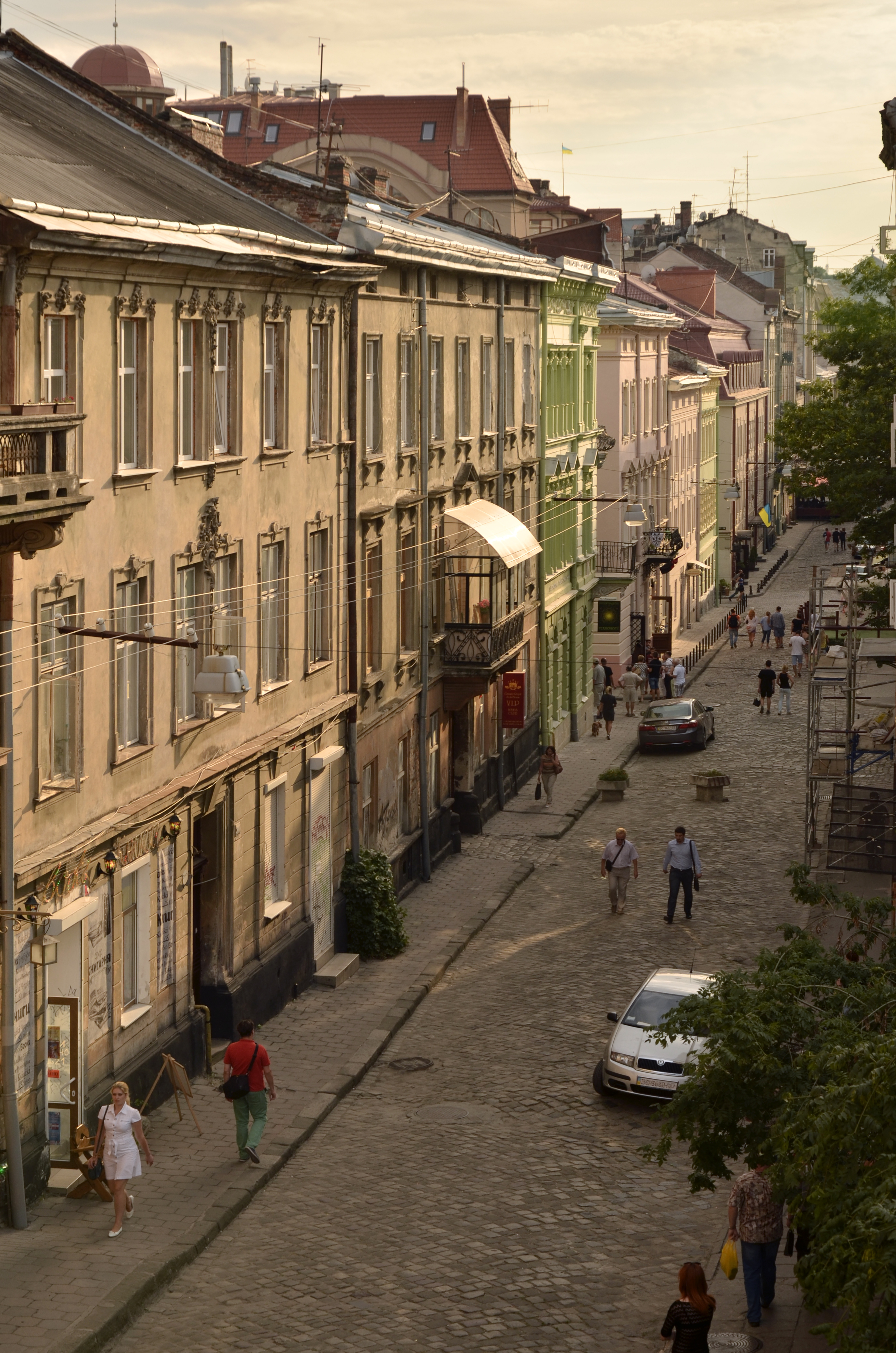 Вулиця Братів Рогатинців у Львові.